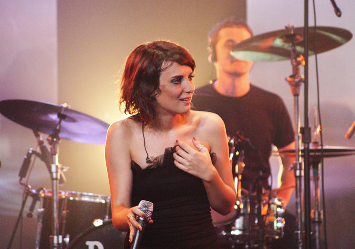 Lorenza Pozza durante a gravação do DVD Lorenza Pozza ao vivo no Memorial de Curitiba em Abril de 2009.